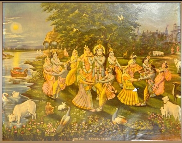 Anant Shivaji Desai Press